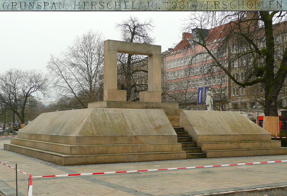 Denkmal für deportierte jüdisches Bürger Hannover mit Fotomontage Gravur Grünspan